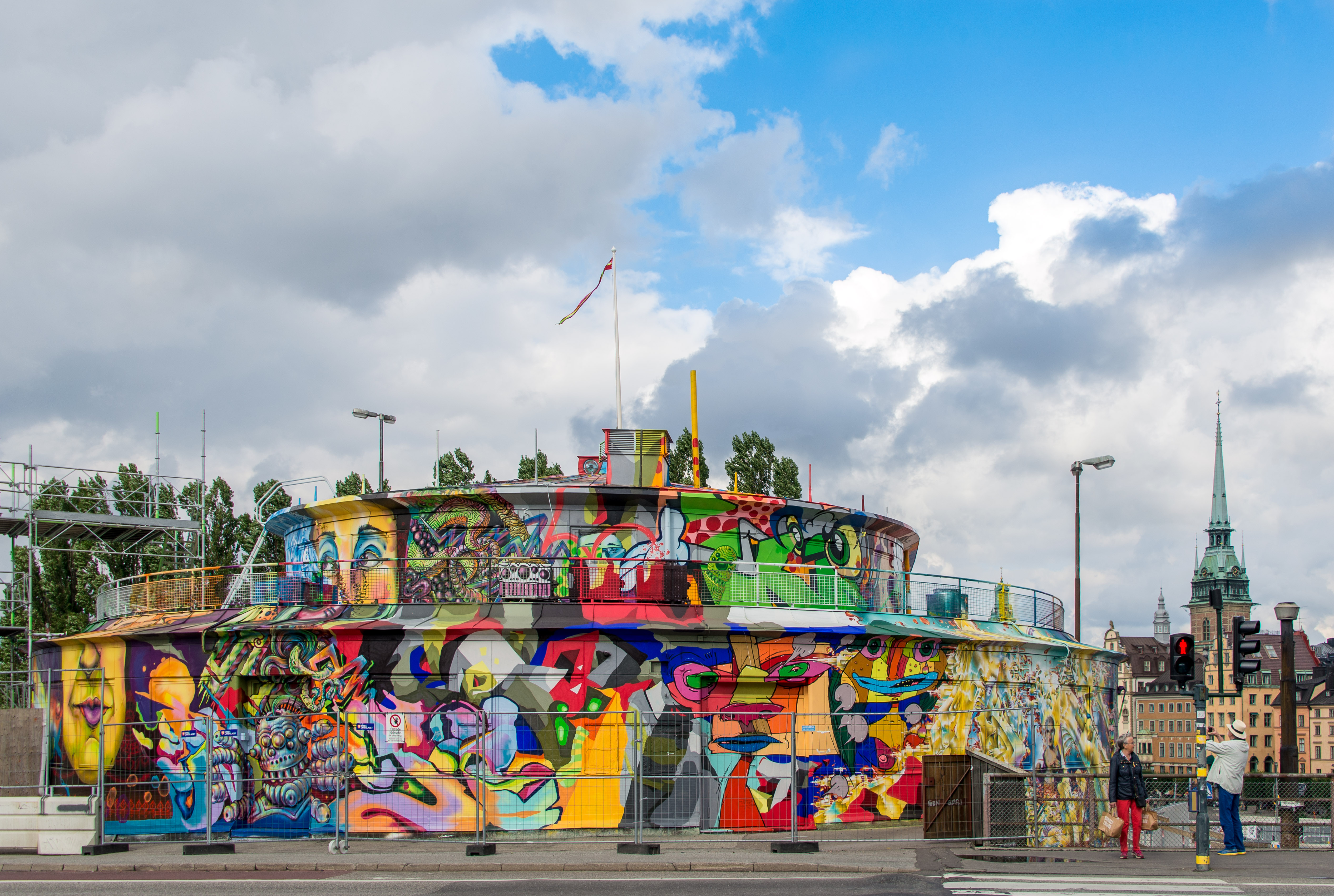 Graffitimålade Kolingsborg, OMSTart Slussen, i Stockholm den 13 september 2015.